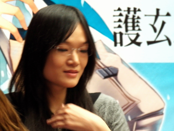 ＜特殊傳說＞新裝版第一卷簽名會的護玄，攝於金石堂書店臺北汀州店。